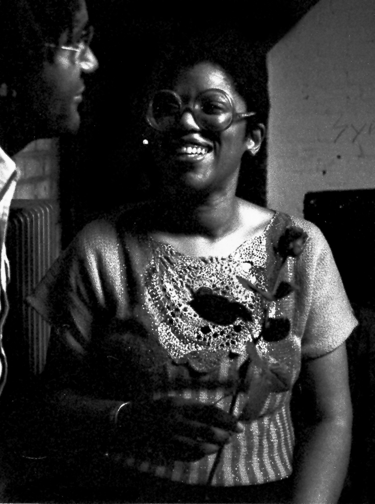 Jeanne Lee 1984 in der Fabrik in Hamburg, links Anthony Braxton